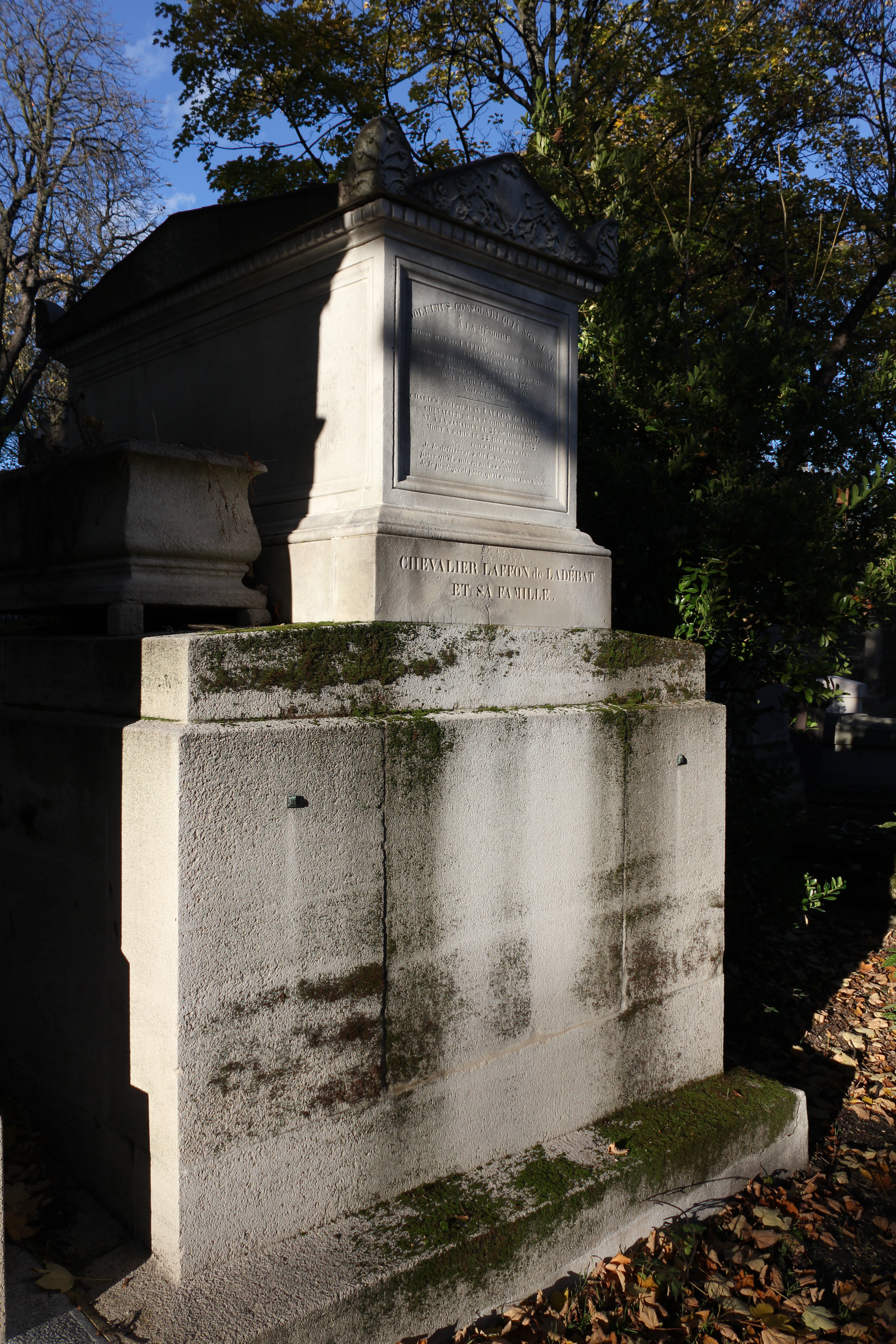 Vue d'ensemble